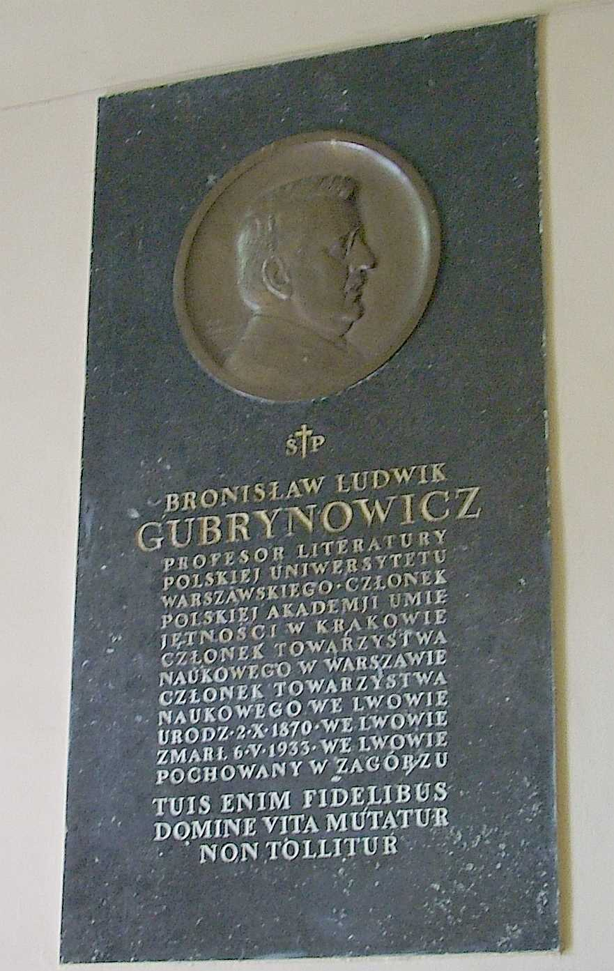 Tablica pamiątkowa B.Gubrynowicza we Lwowie w kościele Marii Magdaleny, maj 2005, autor: Stanisław Kosiedowski.